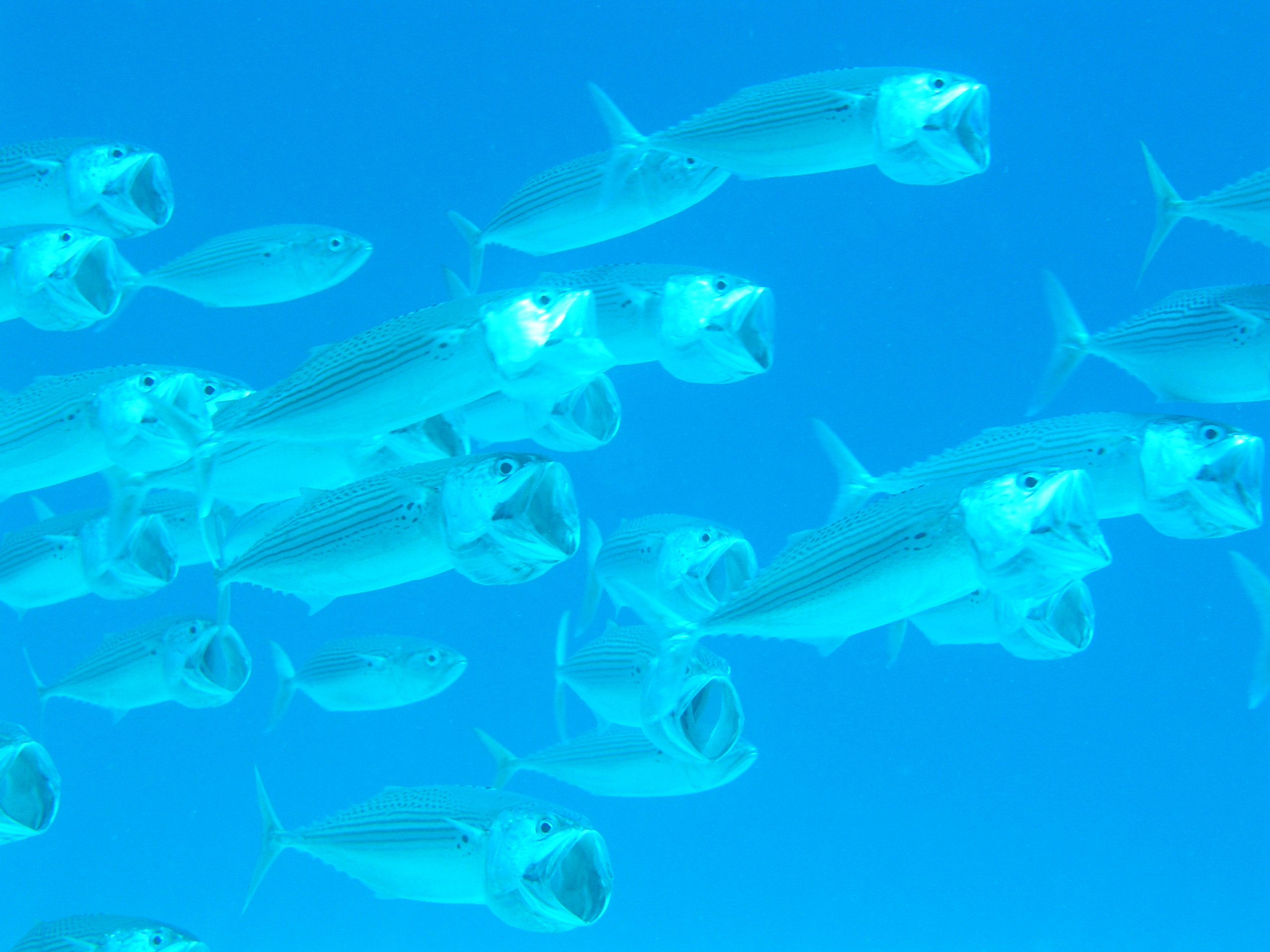 Rastrelliger Kanagurta bei Marsa Shagra, Ägypten